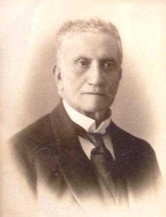 Retrato del Licenciado Isidro Rojas